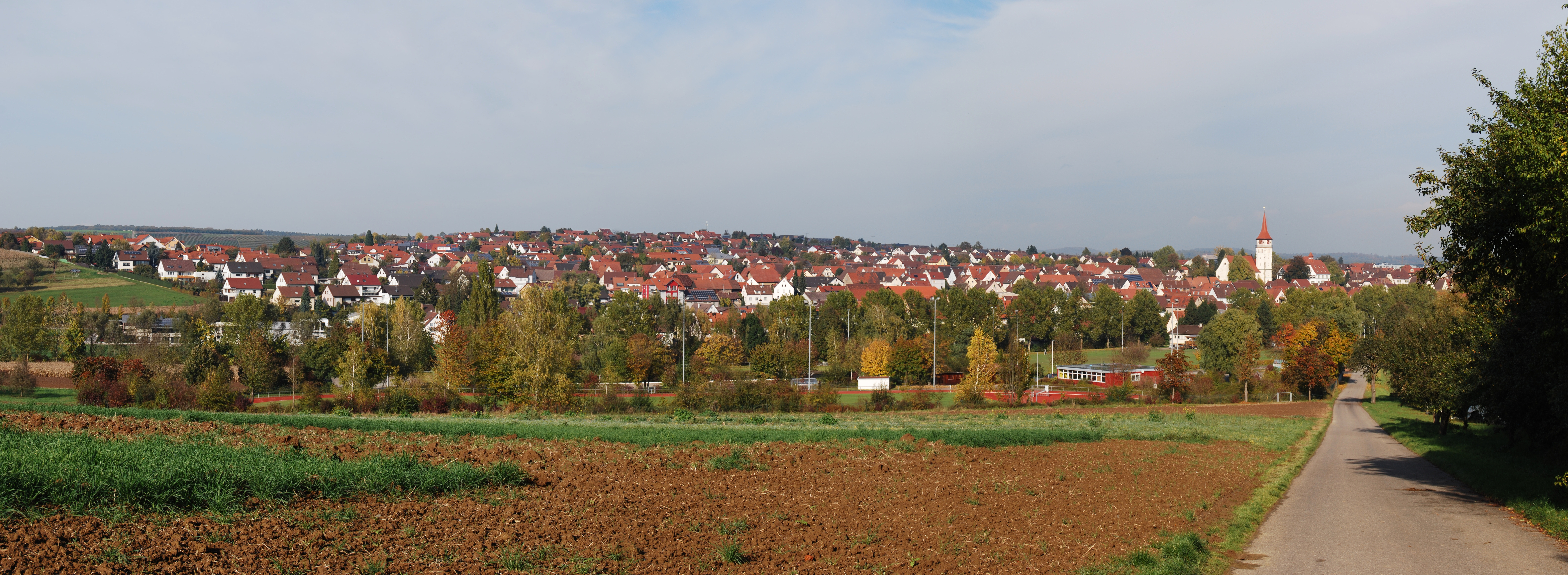 Panoramaaufnahme von Ilsfeld, fünf Teile zum Stitchen